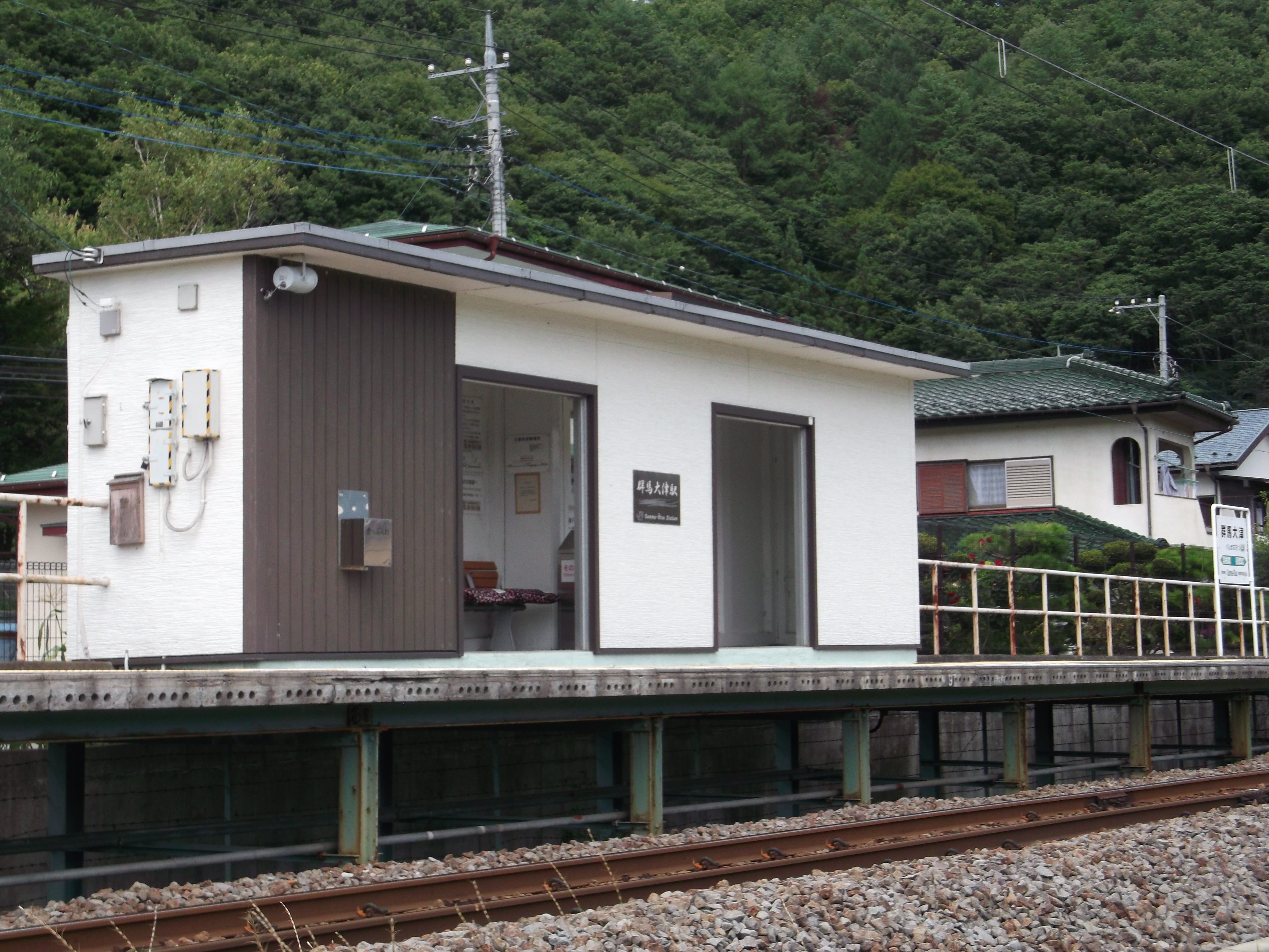 ＪＲ吾妻線 群馬大津駅